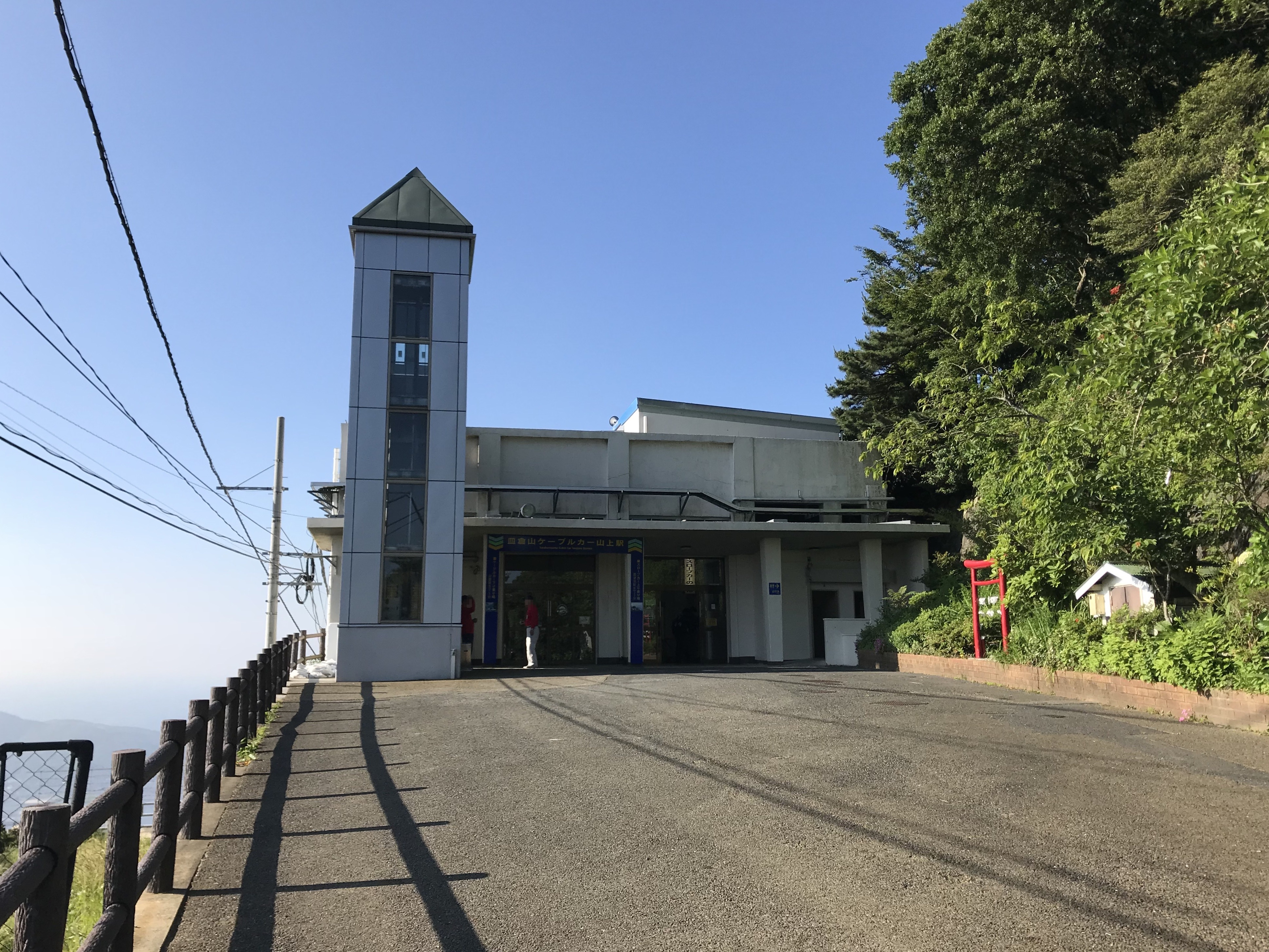 山上駅の駅舎